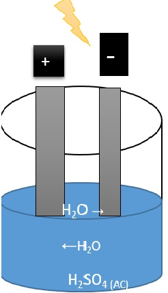 Electrolisis del agua